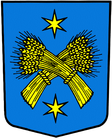 Wappen von Salins Kanton Wallis Schweiz